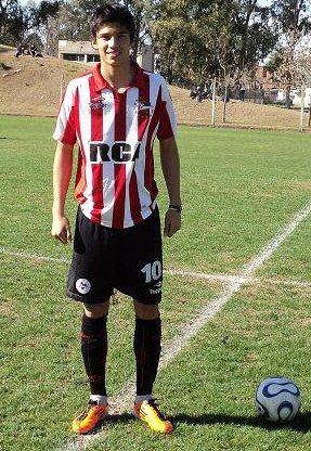 Tucu en inferiores